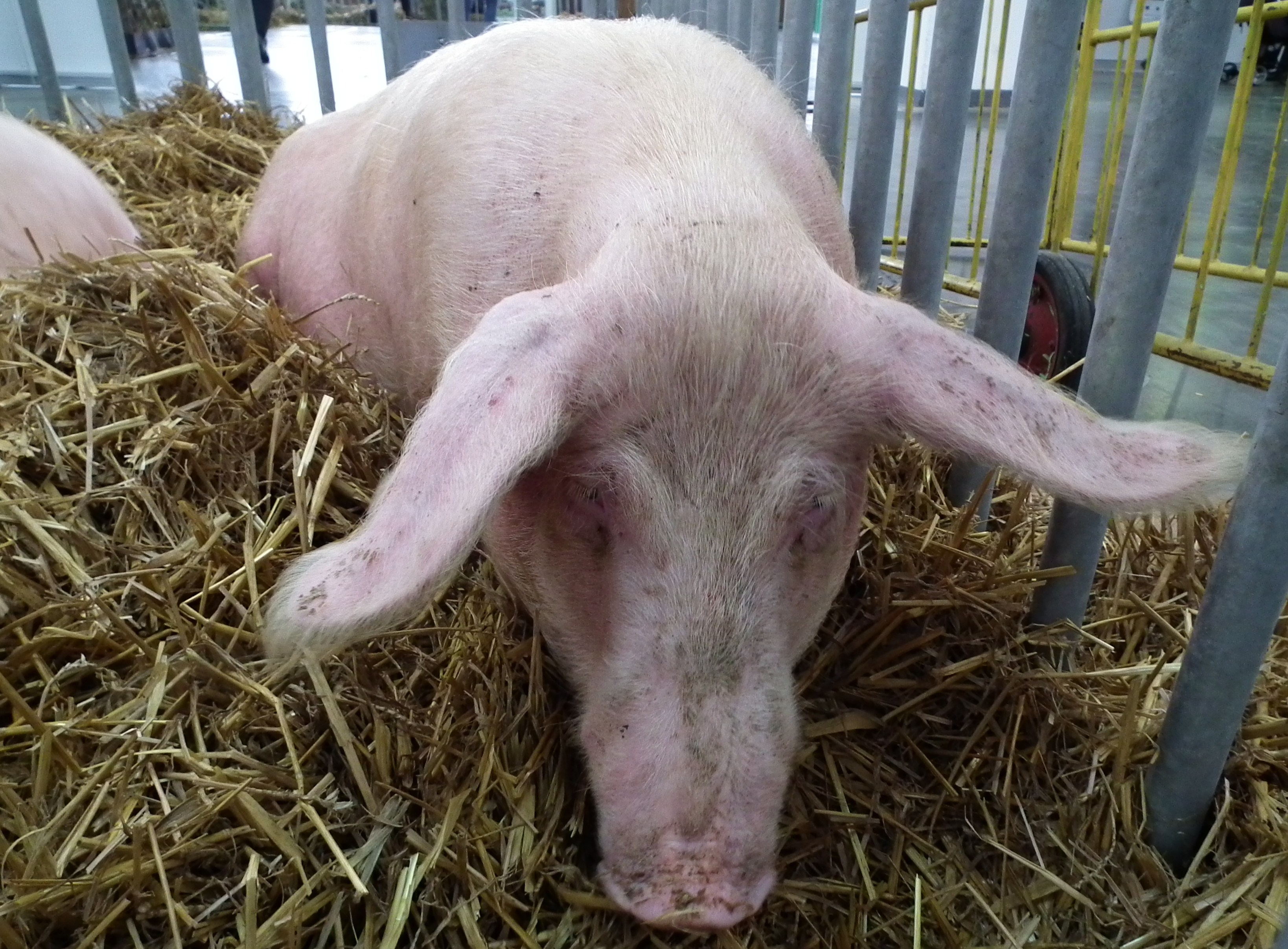 Świnia rasy złotnicka biała.